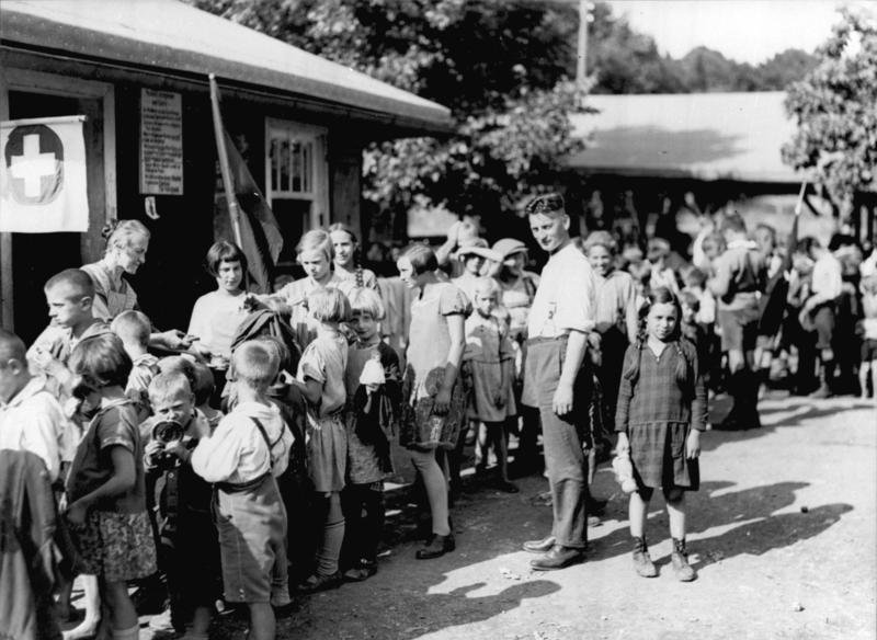 Zentralbild/E.Heilig 10.3.1961 Aus dem Leben der KPD (1926) Immer schon war das Wohlergehen der Jugend eines der Hauptanliegen der KPD. In einem Ferienlager der Internationalen Arbeiter-Hilfe im Waldheim Stuttgart-Sillenbuch erholen sich Arbeiterkinder. 18192/4N